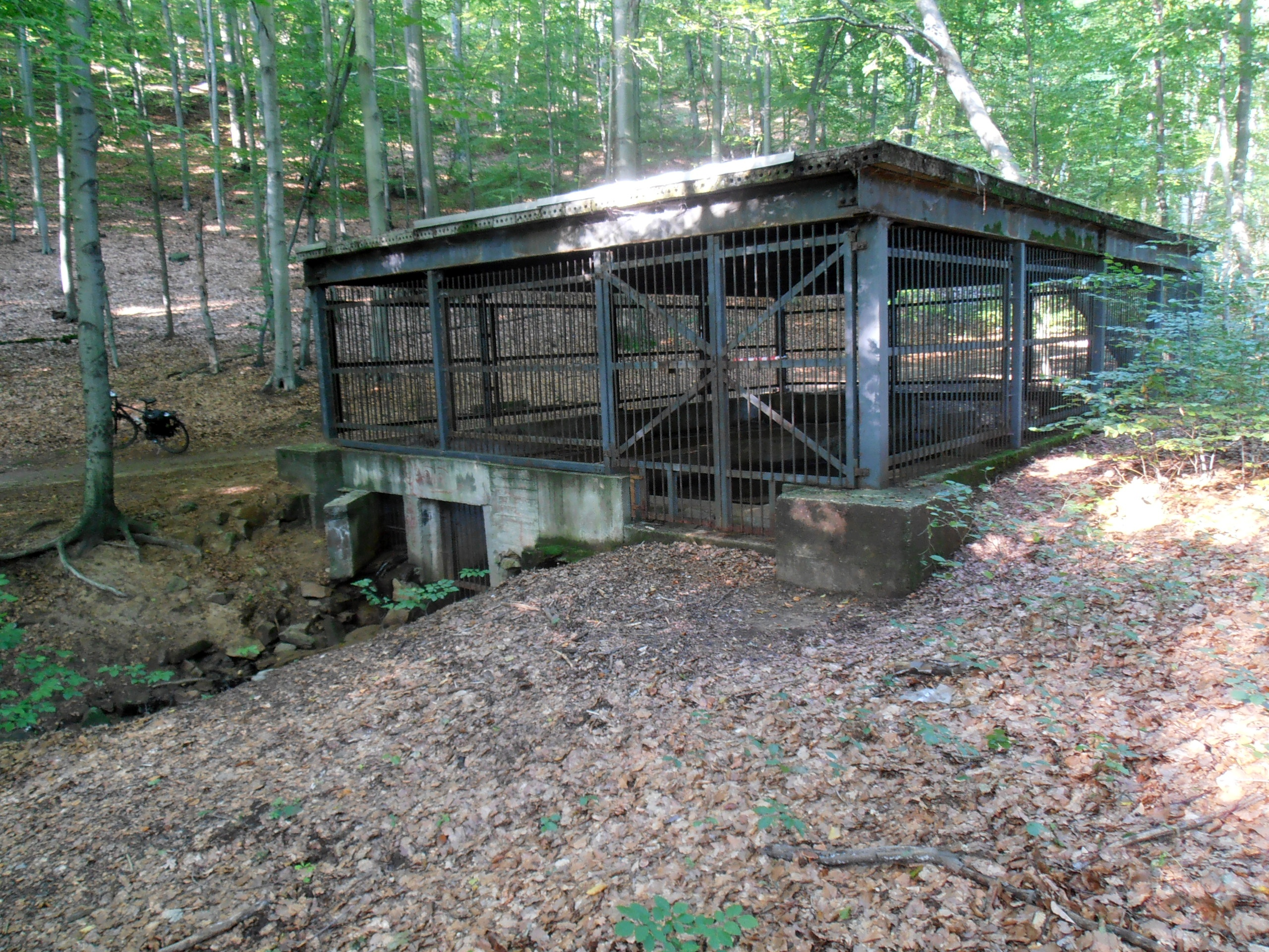 Historische Wasserversorgung von Schloss Albrechtsberg am Mordgrundbach, Blick von SW